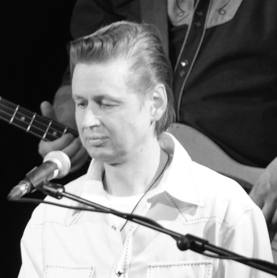 Juki Välipakka Kanneltalossa 4.3.2013